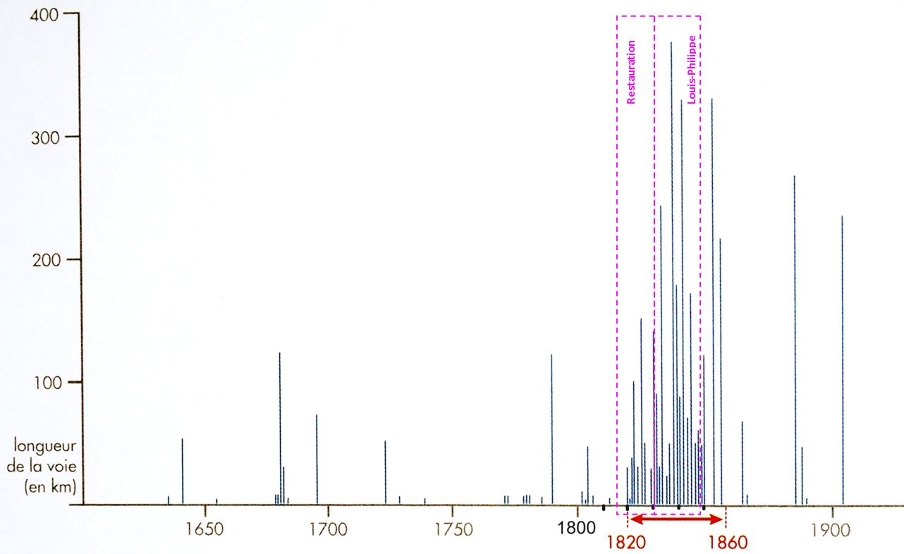 Longueur des canaux achevés par année.